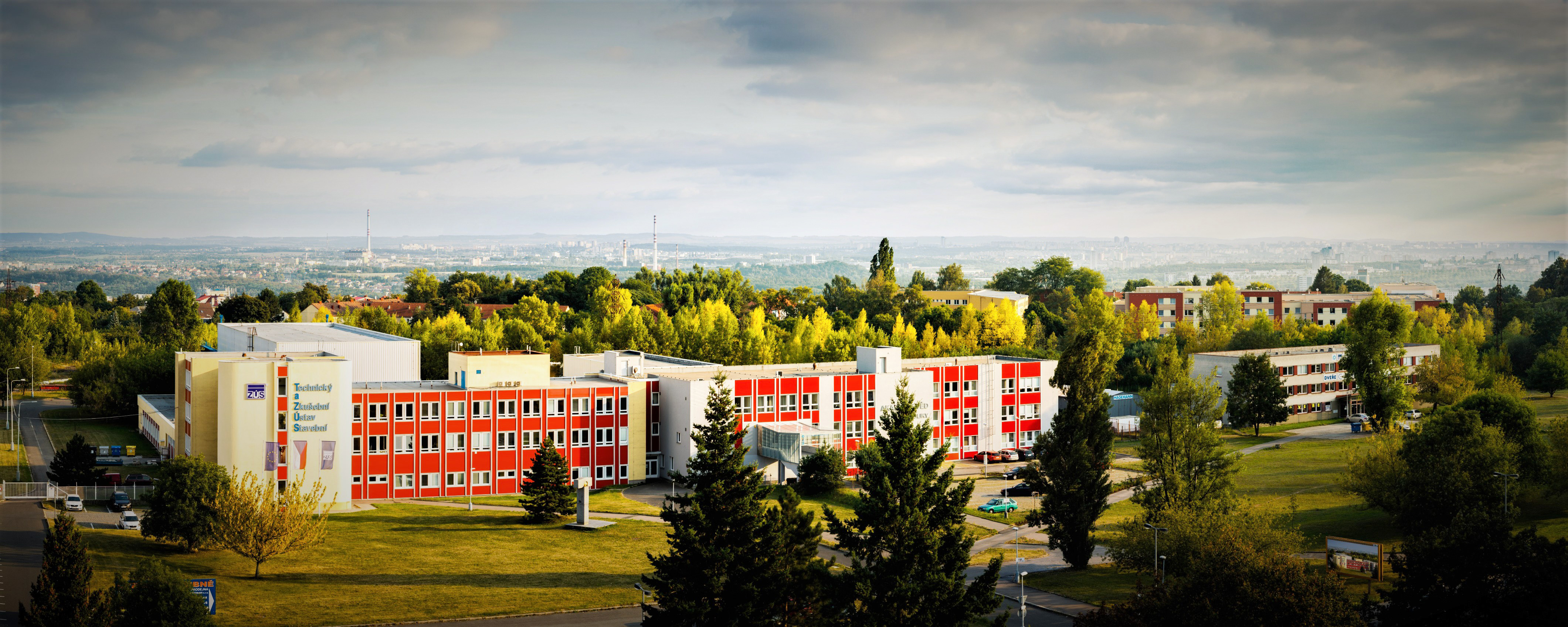 Technický a zkušební ústav stavební Praha, s.p., pobočka Praha